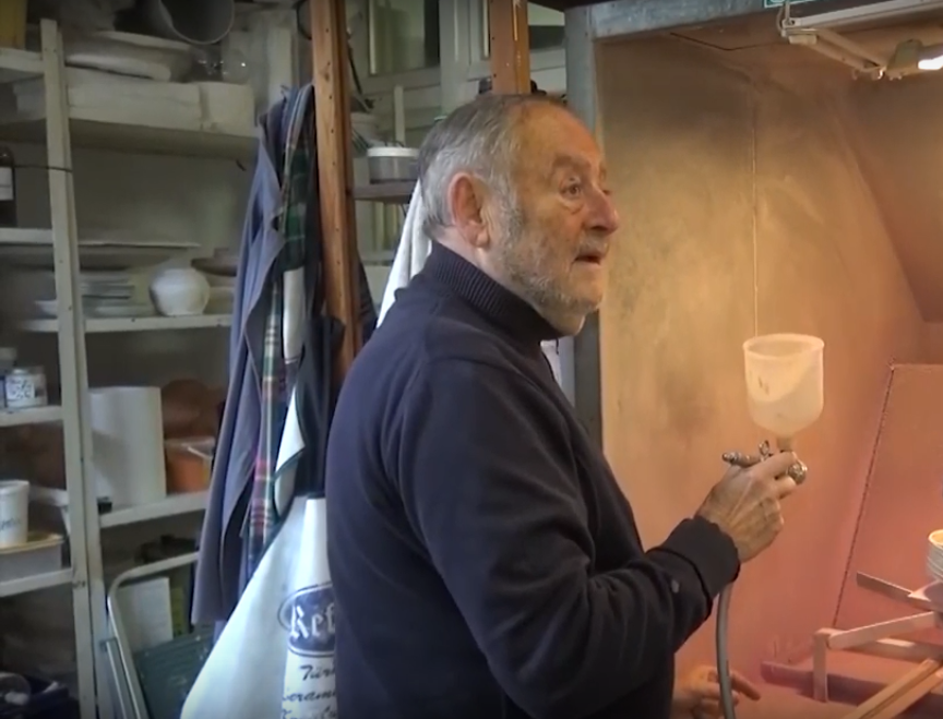 Johan van Loon in 2018 in zijn atelier. Screenshot uit K I K : Ellis Pijnenborg en Johan van Loon. "Maandelijks cultuur programma gepresenteerd door voorheen stadsdichter Kees van Meel die elke keer twee kunstenaars portretteert." De video is beschikbaar op Commons Wikimedia als File:K I K - Ellis Pijnenborg en Johan van Loon.webm.